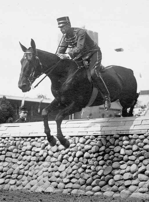 Ernst Casparsson, Stockholm Olympics